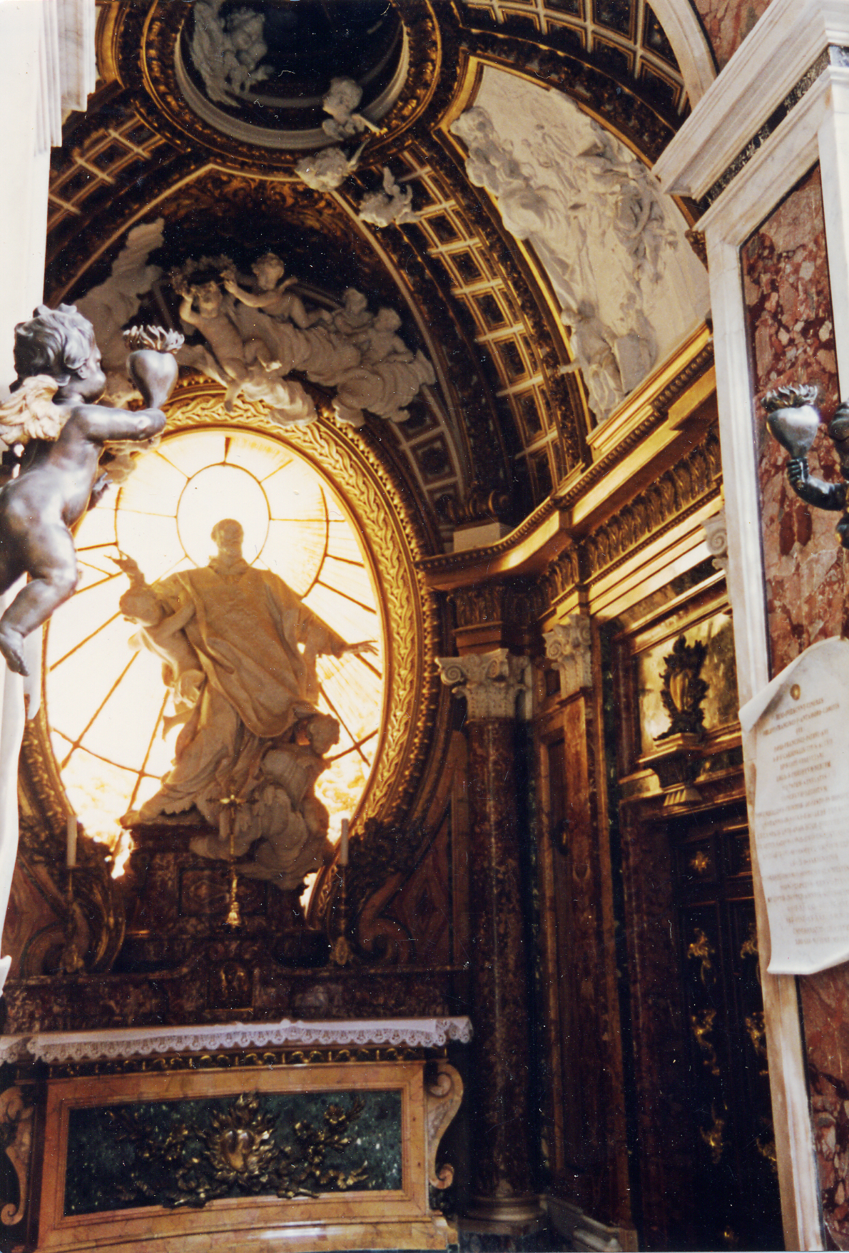 Cappella Antamori, San Girolamo della Carità, Rome. Architecture by Filippo Juvarra, sculpture by Pierre Le Gros the Younger, 1708-1710.